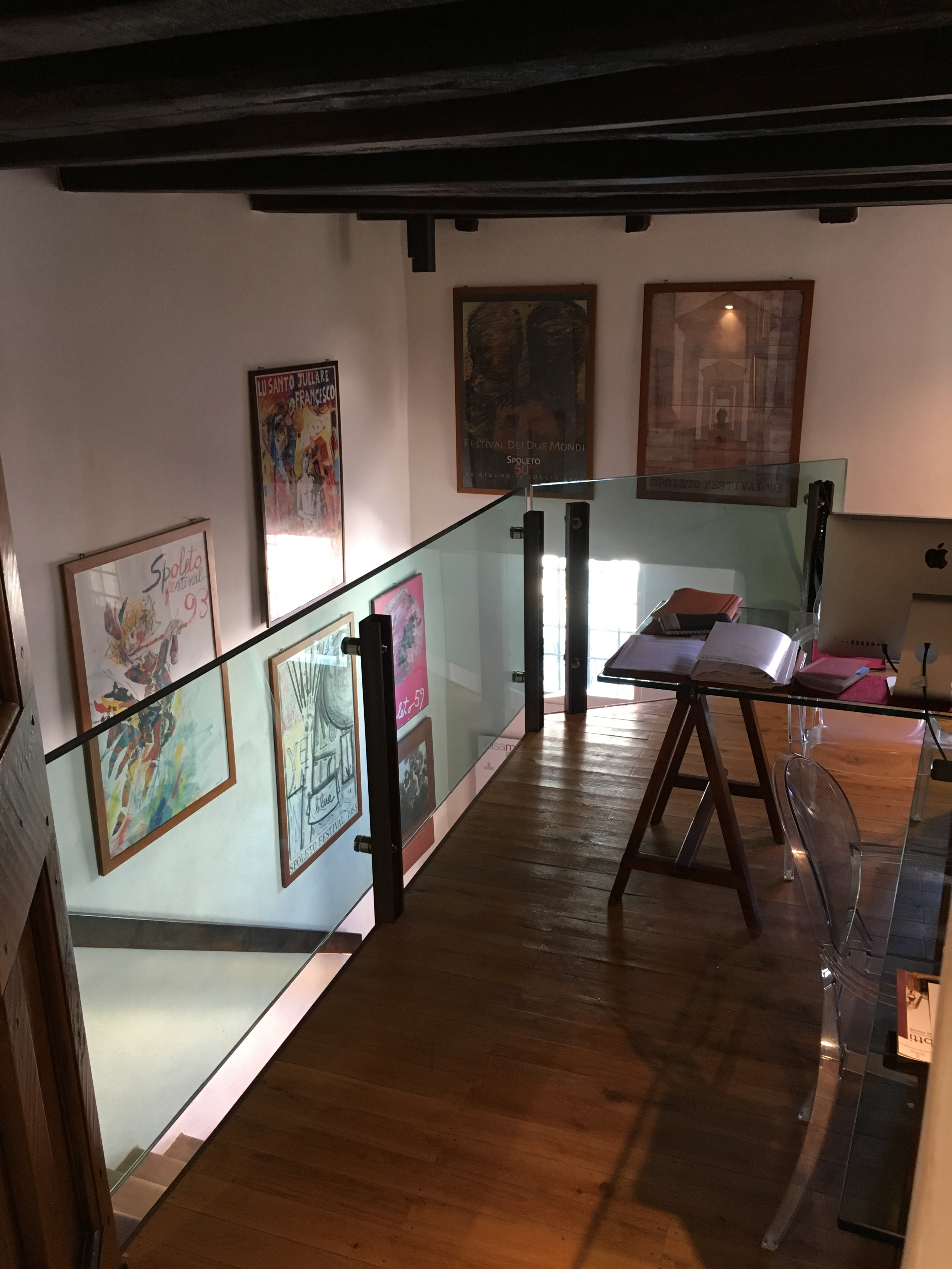 Casa Menotti Spoleto